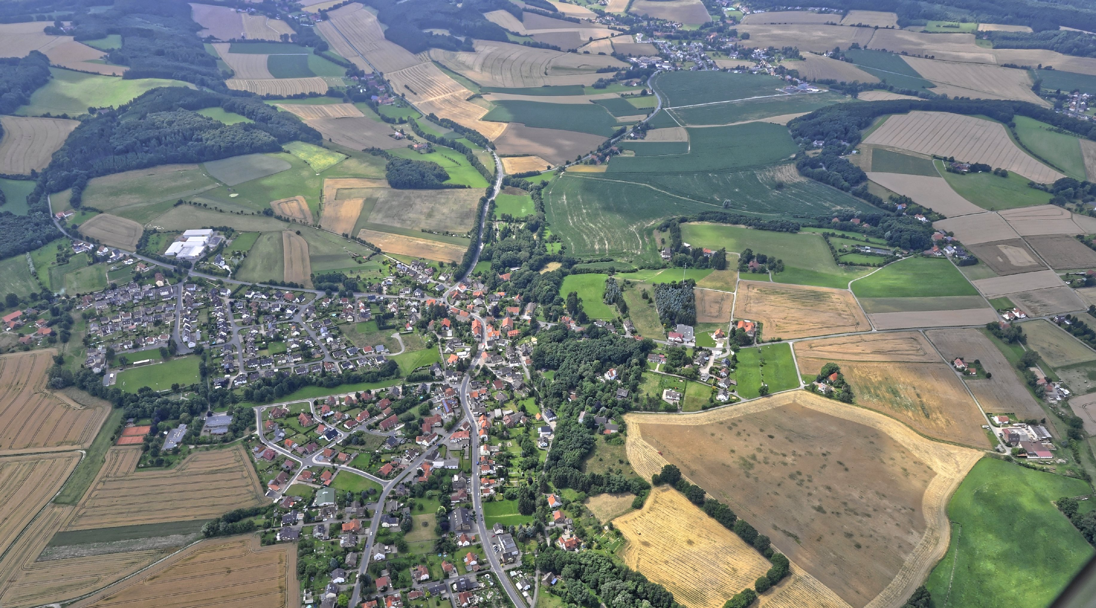 Bilder vom Flug Nordholz Hammelburg 2015